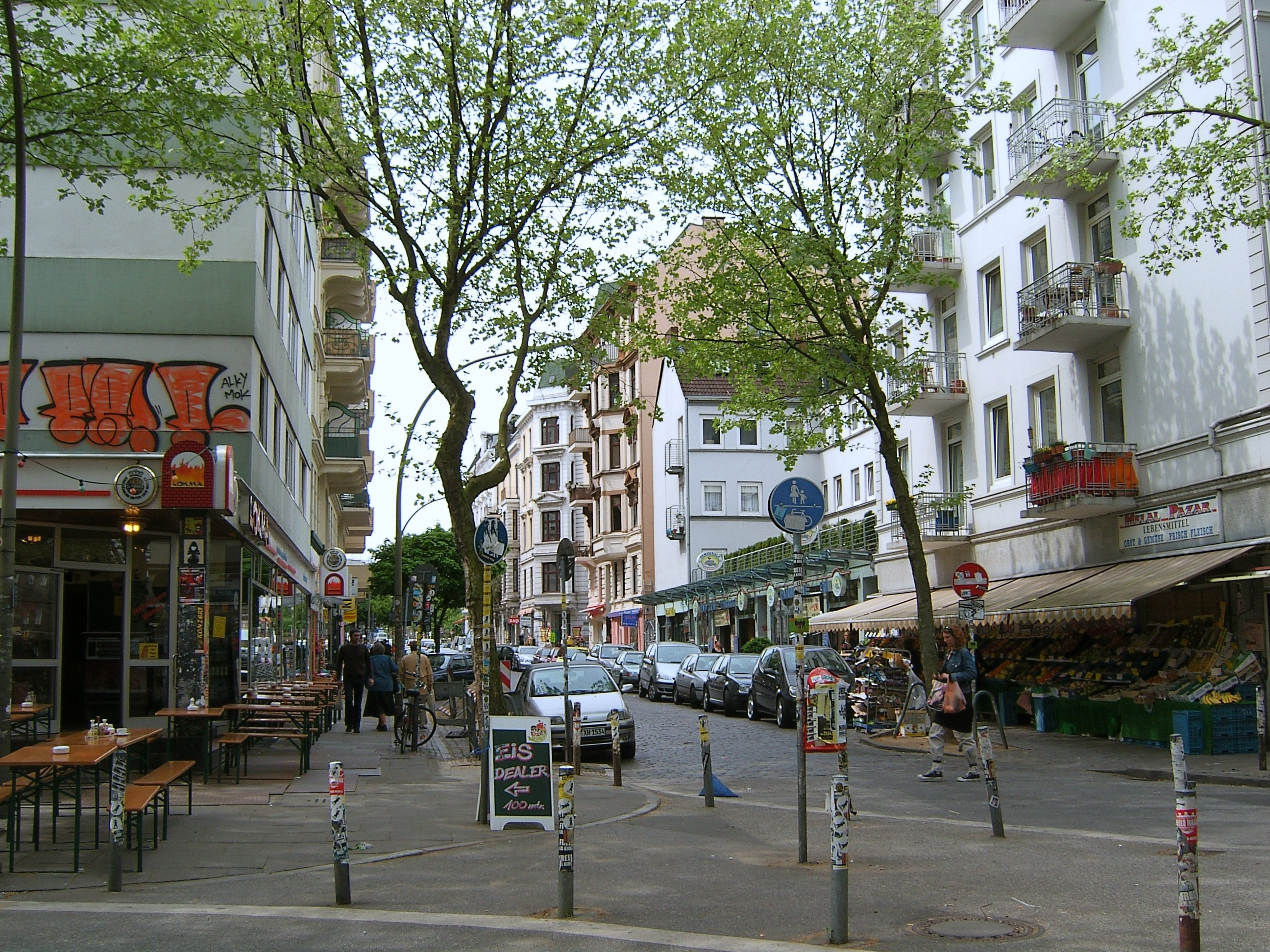 Blick in die Susannenstraße im Schanzenviertel in Hamburg.